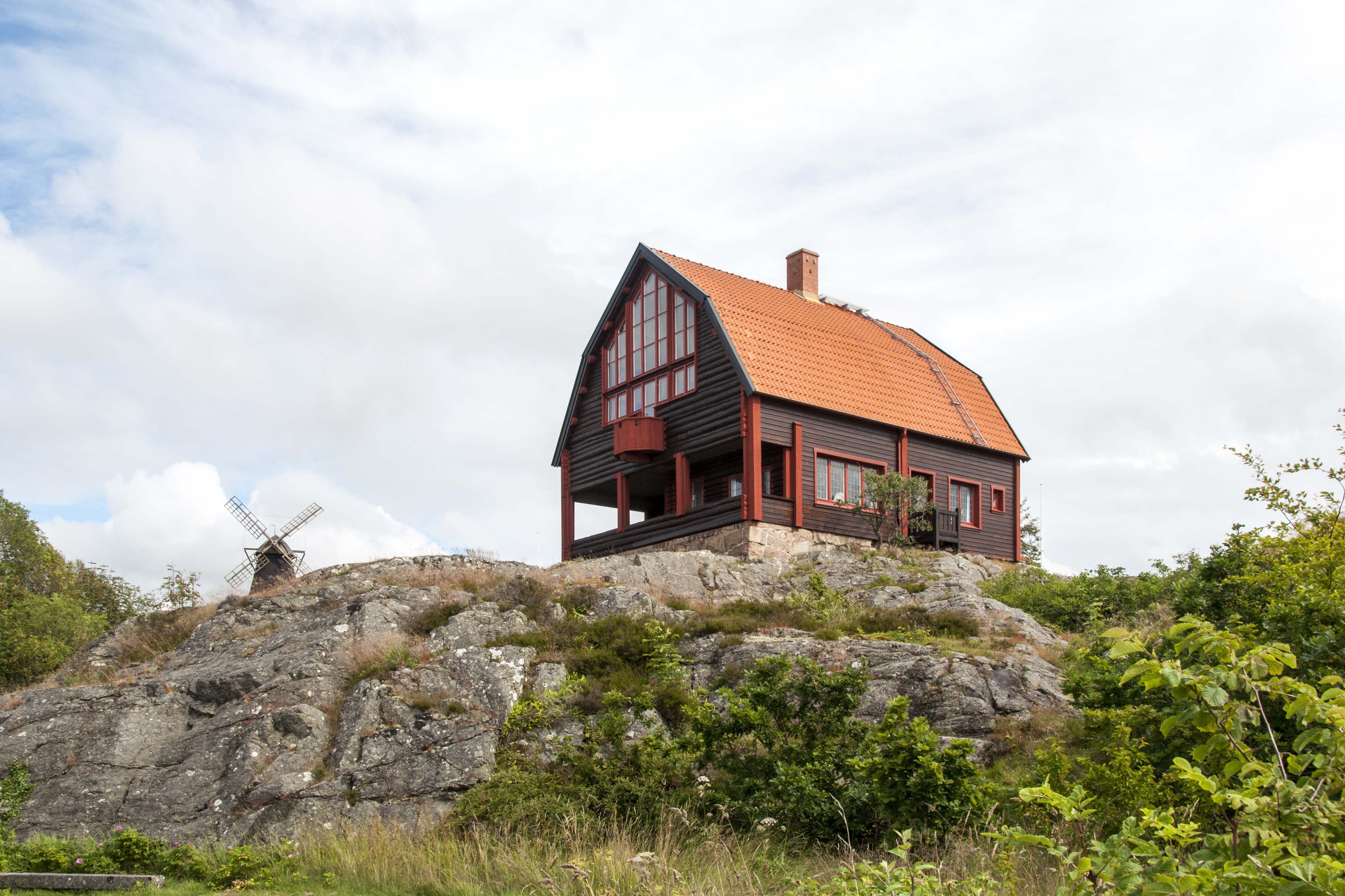 Carl Wilhelmsons ateljévilla i Fiskebäckskil. Byggnadsår 1913. Arkitekt Ivar Calmander.